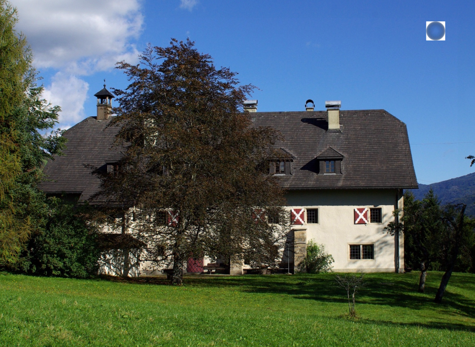 Schloss Heuberg